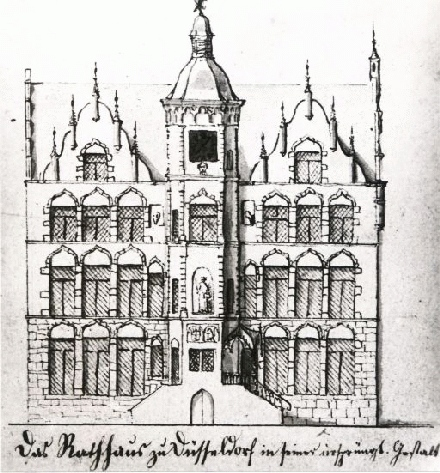 Das Alte Rathaus zu Düsseldorf vor seiner Barockisierung.jpg